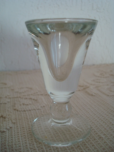 Petit verre à liqueur dit "faux-cul" d'une contenance de 1cl (deux cuillère à café) de la région d'Auvergne.